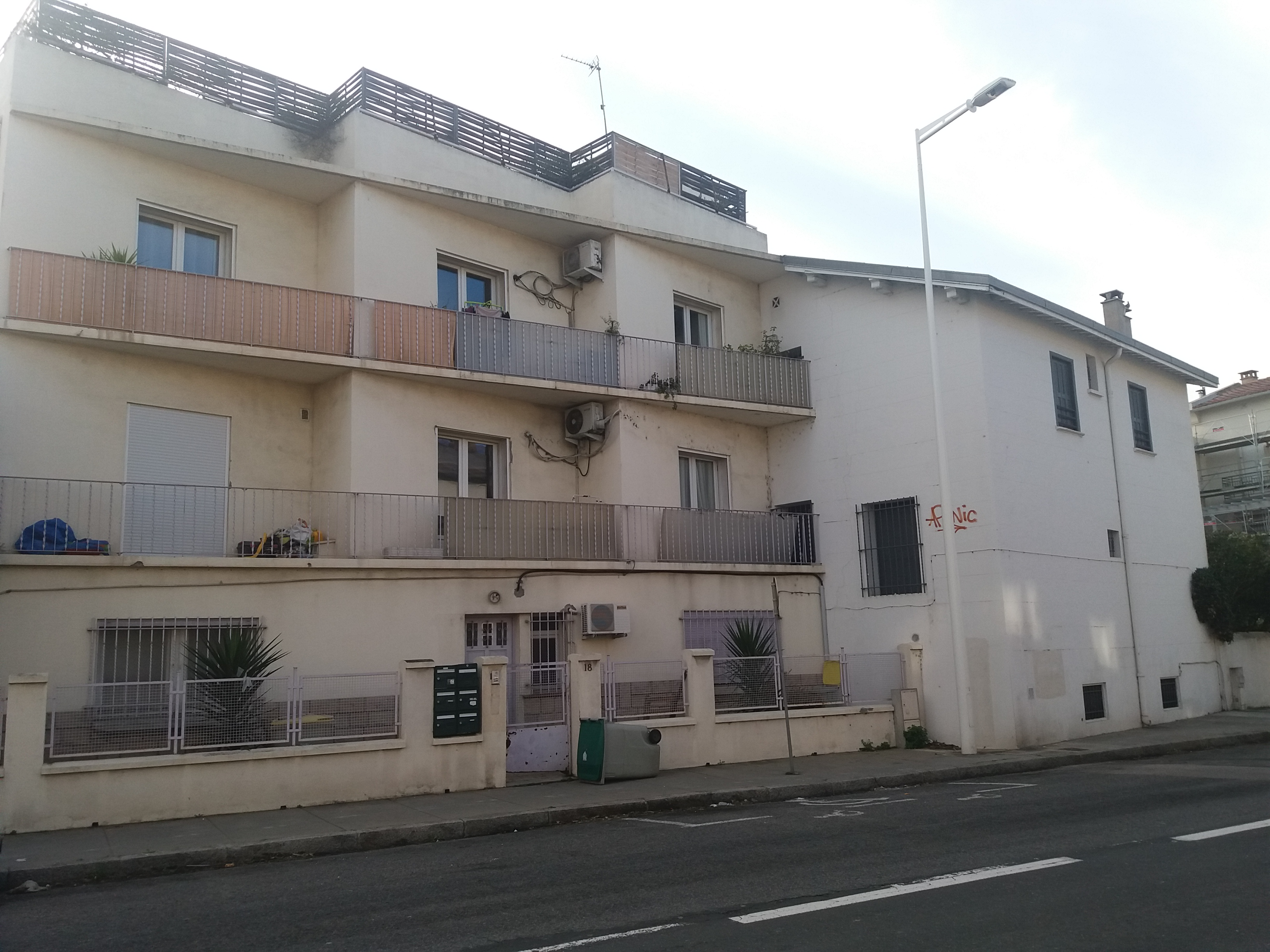 Clínica dels Plàtans, de Perpinyà.